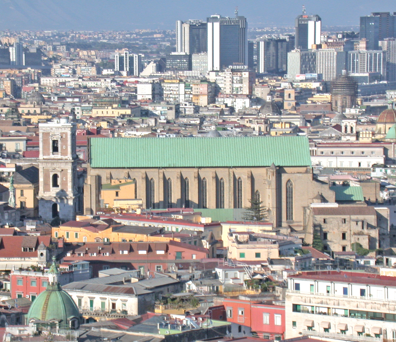 Italia, regione Campania, Napoli, chiesa di Santa Chiara, vista panoramica da presso la certosa di San Martino.